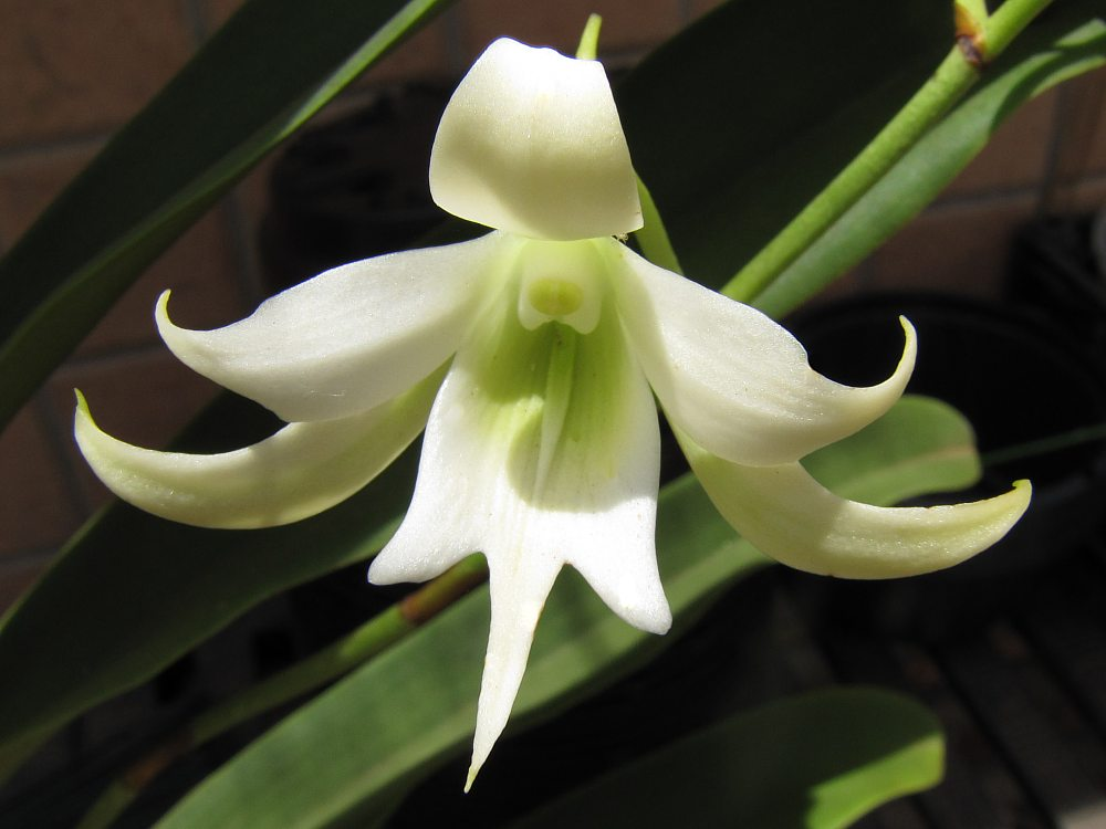 Sobennikoffia humbertiana - flor